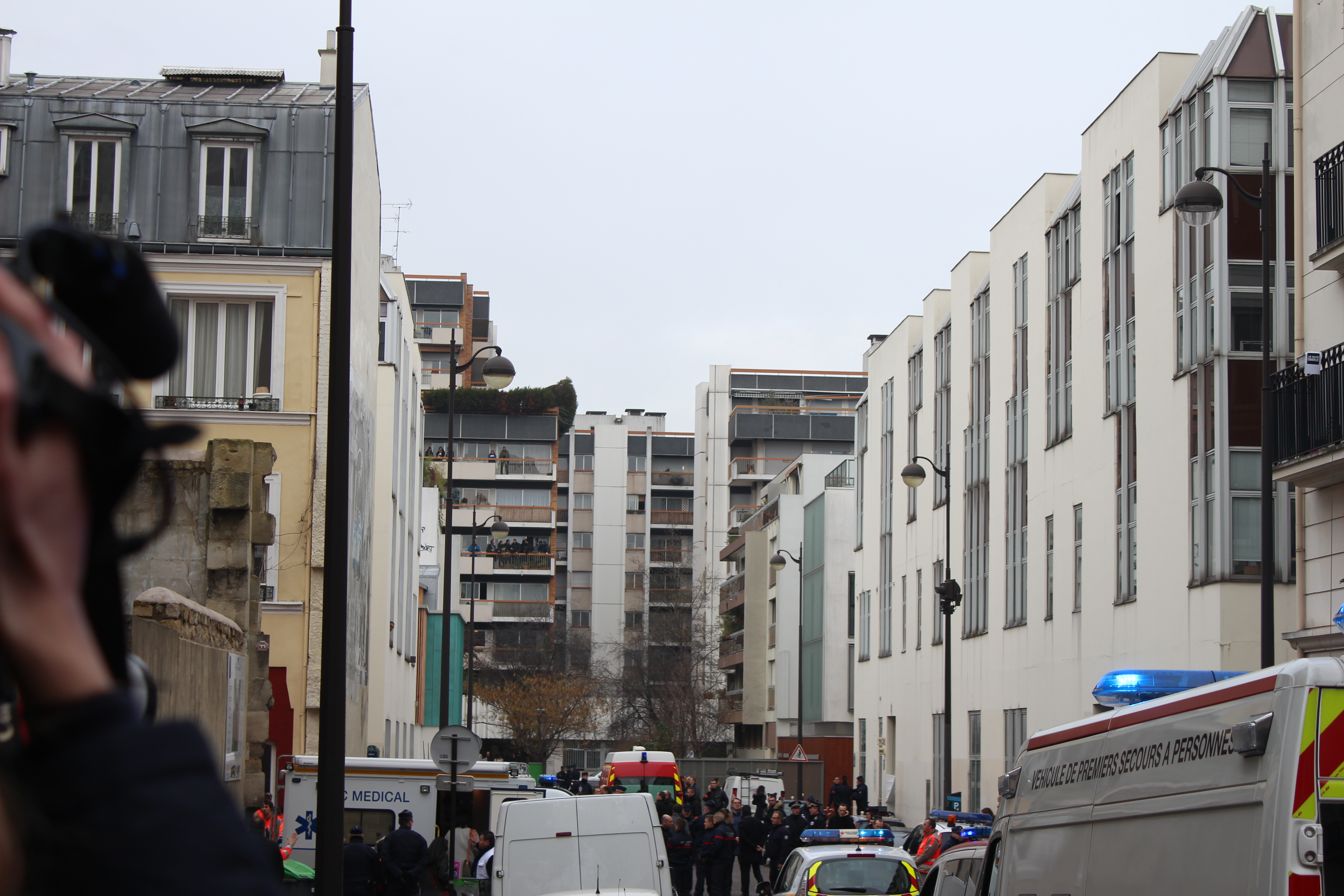 Vue de la zone du 11e arrondissement interdite aux badauds par la police après la fusillade au siège de Charlie Hebdo, prise avec l'aide du journaliste de LCP Jérémie Hartmann.